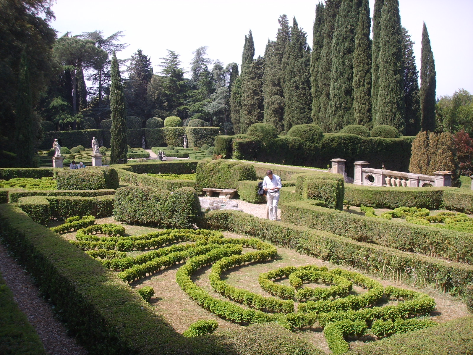 Parterre garden at Villa Schifanoia — Fiesole / Tuscany.